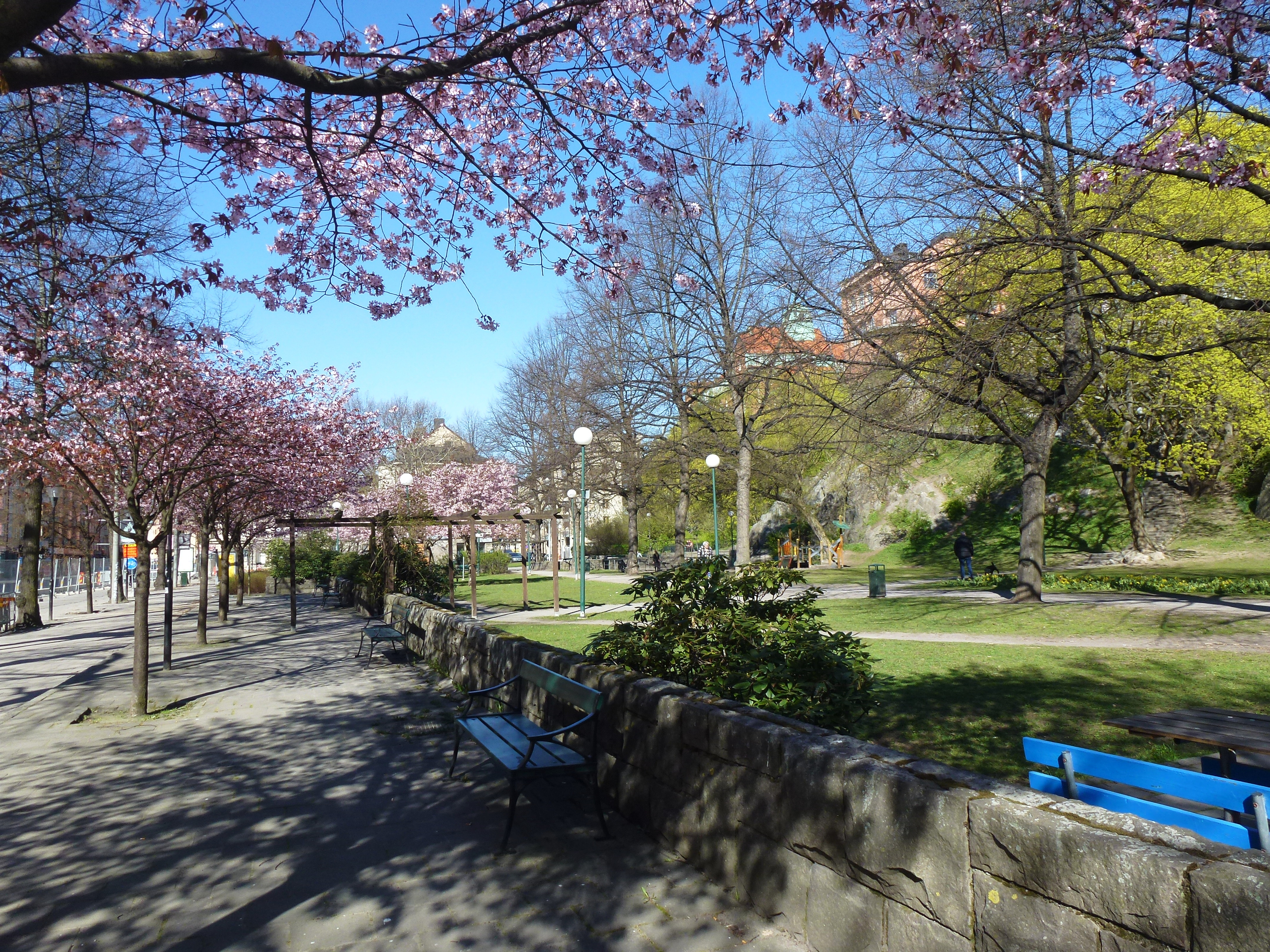 Stigbergsparken, vy mot väst